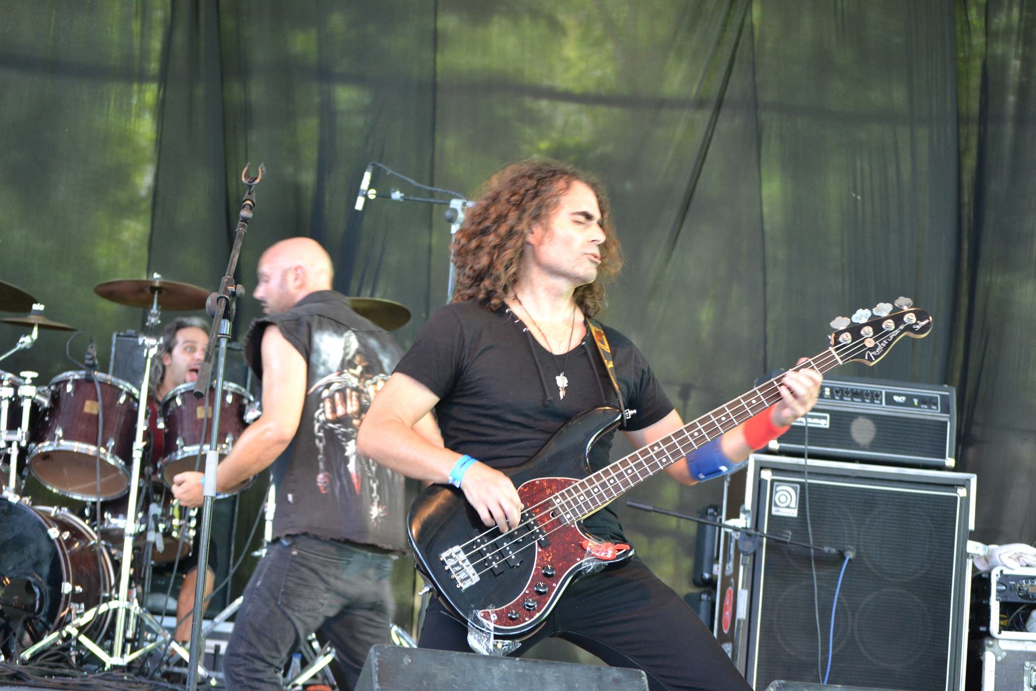 Esclavitud